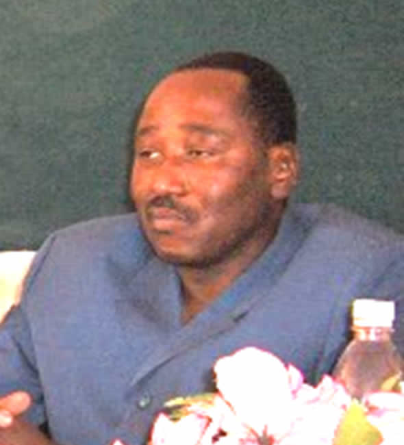 Amadou Gon Coulibaly, Ministre de l'Agriculture de Côte d'Ivoire